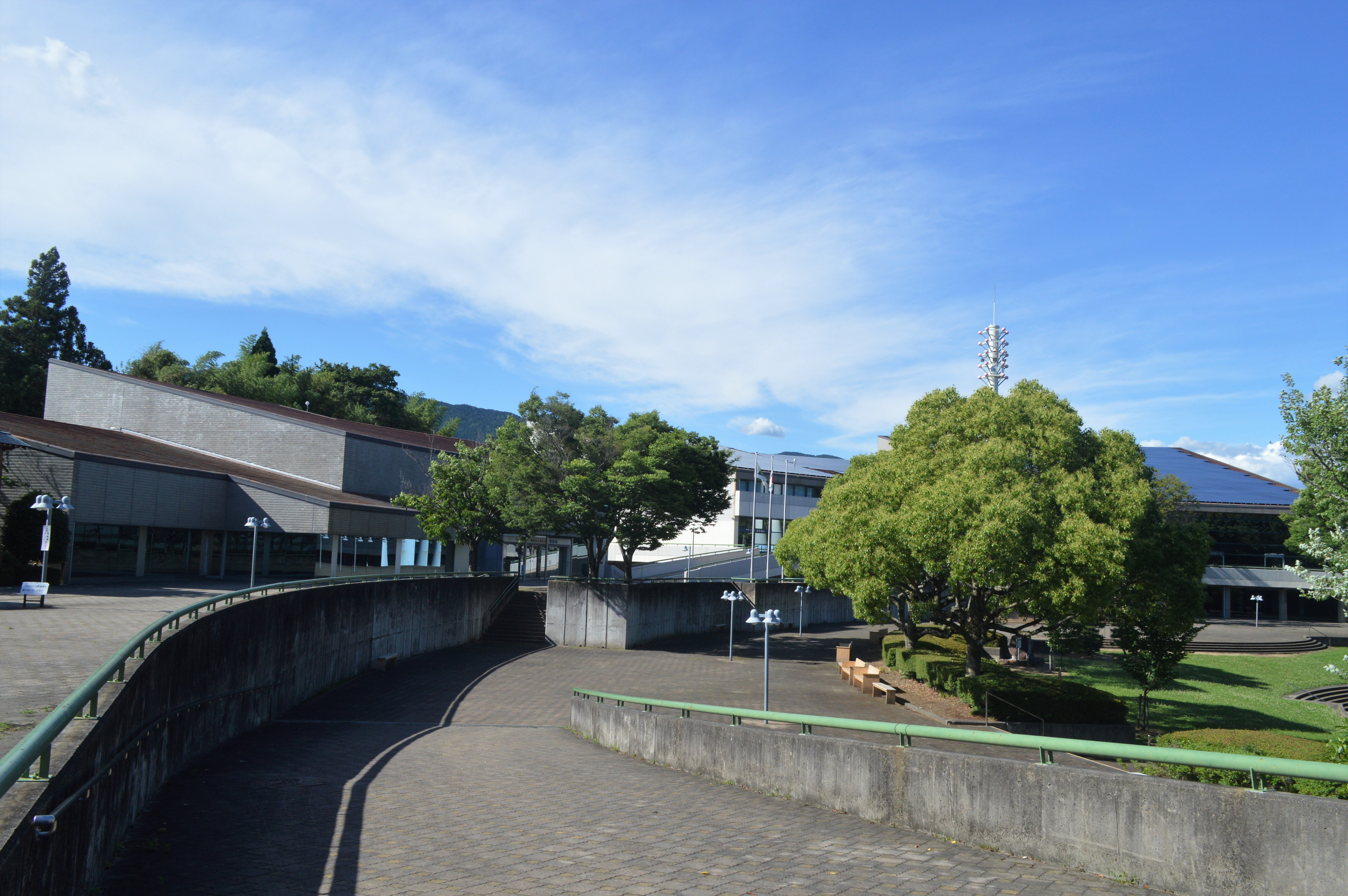 愛知県新城市の新城地域文化広場。左手前は新城図書館。